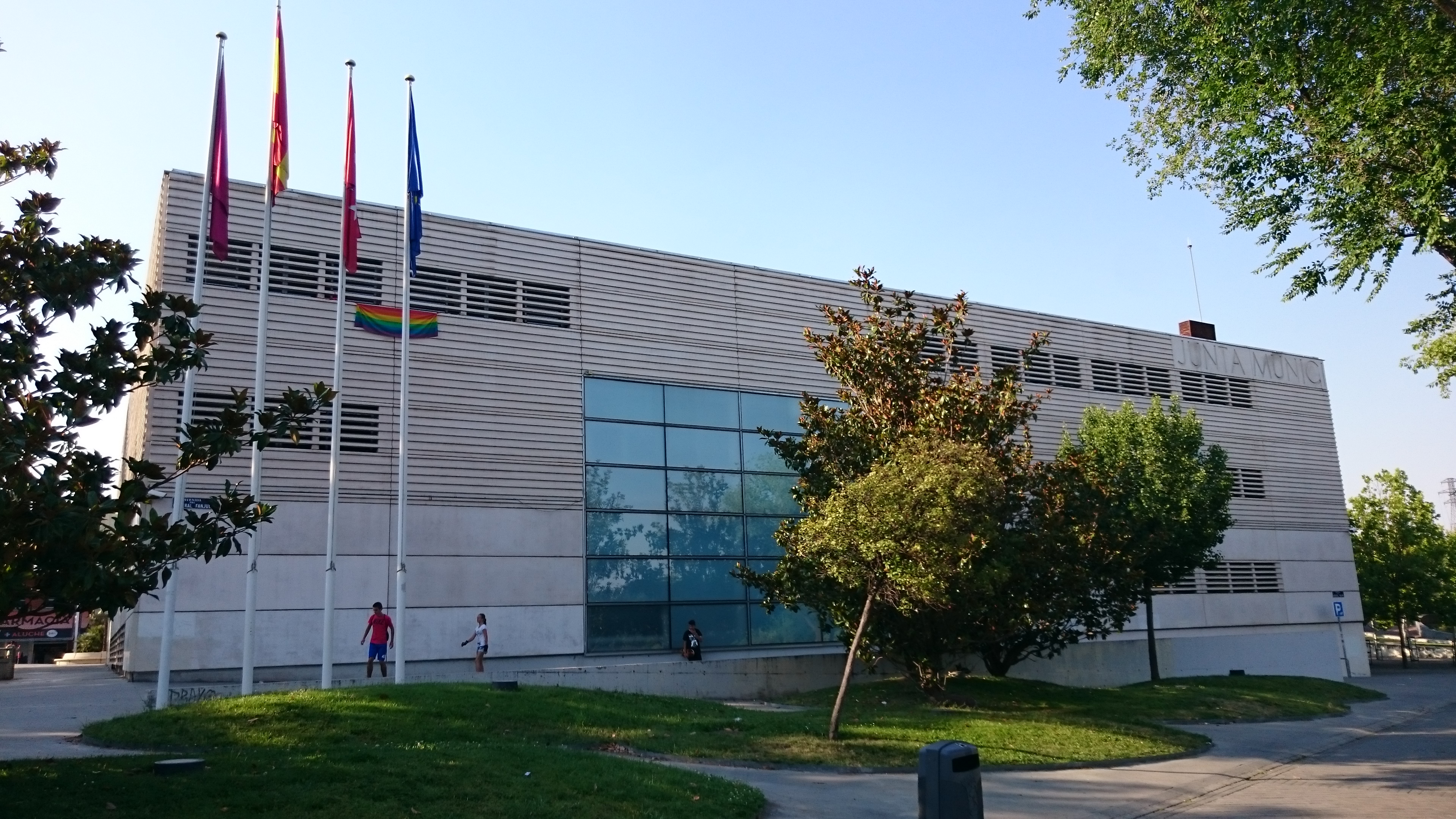 Junta Municipal de Latina (Madrid), con la bandera gay ondeando en su fachada